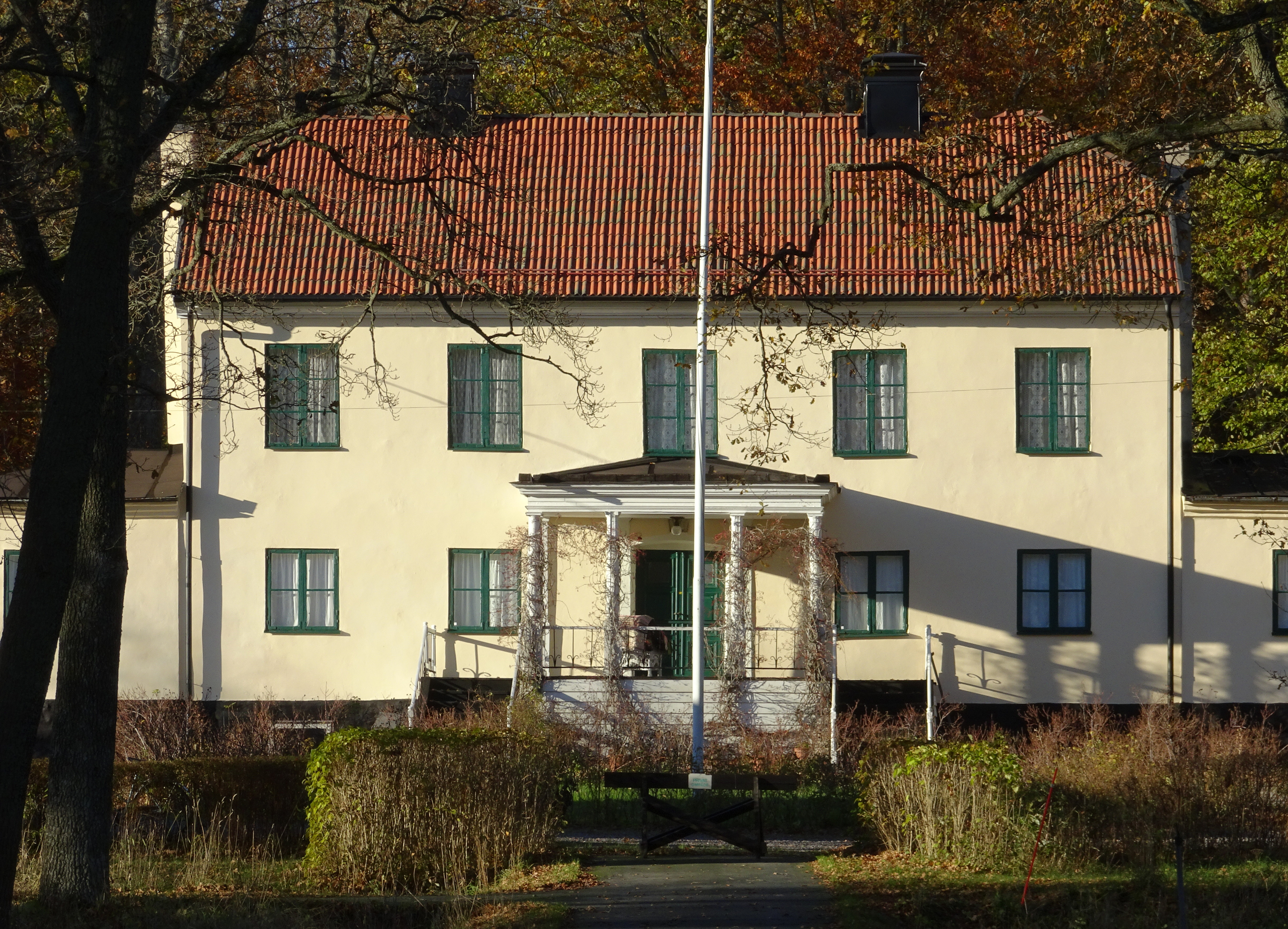 Hammar gård i Västerhaninge